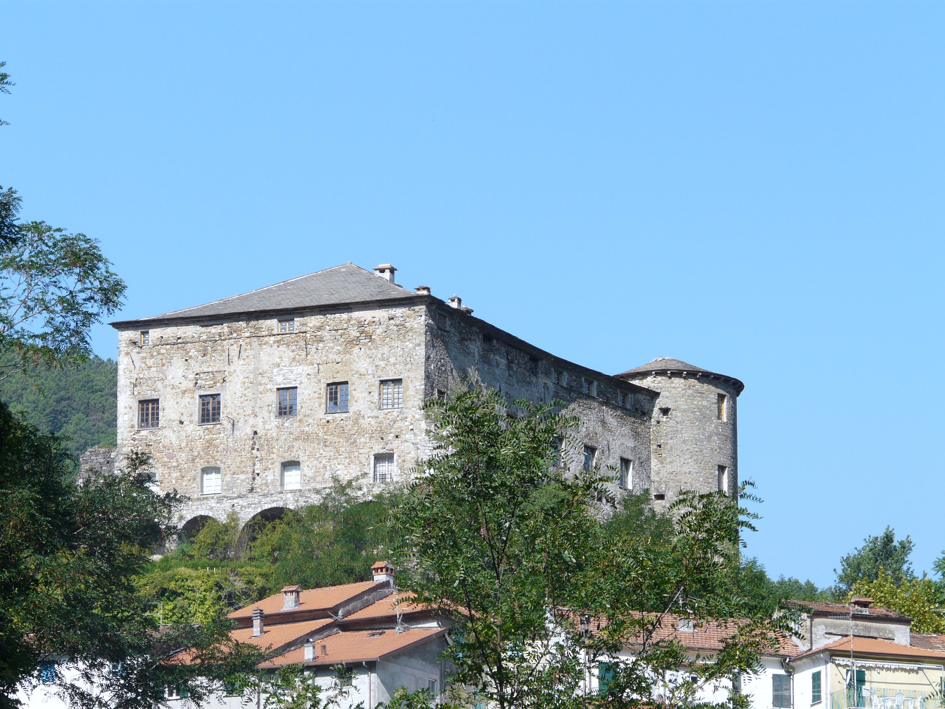 Castello Doria Malaspina, Calice al Cornoviglio, Liguria, Italia